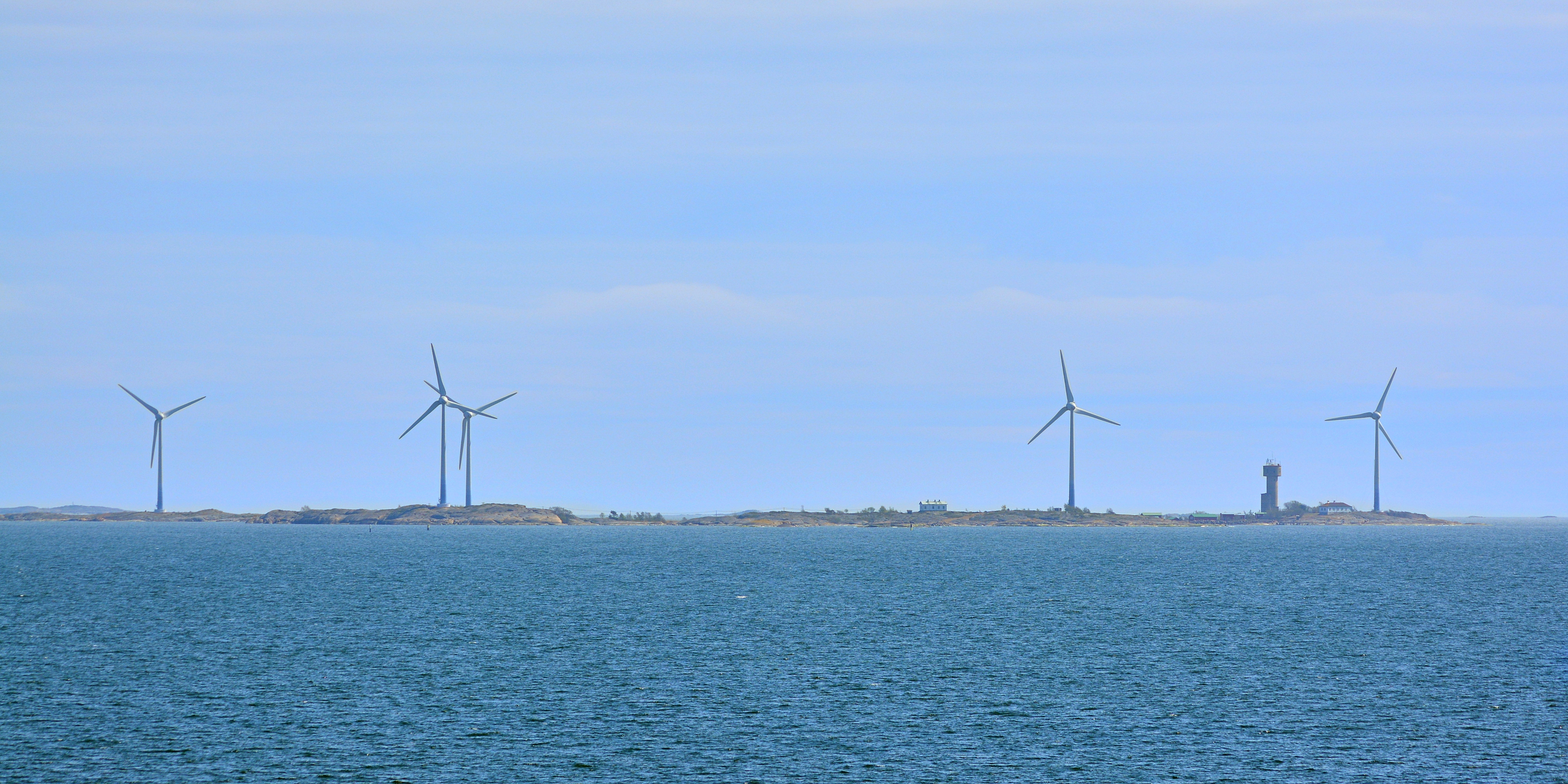 Stora Båtskär söder om Åland